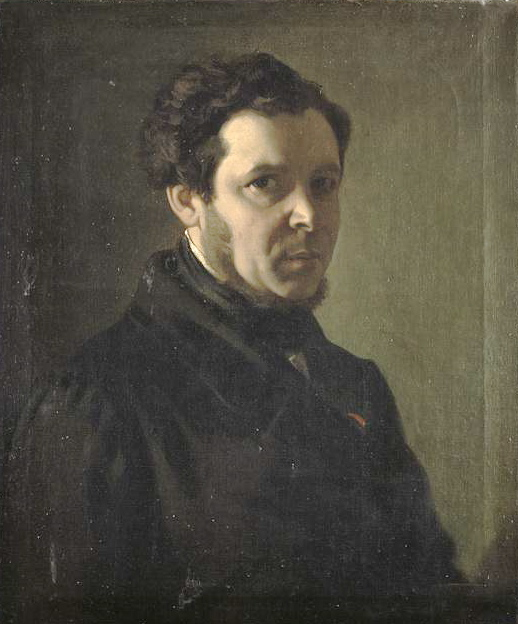 Victor Mottez